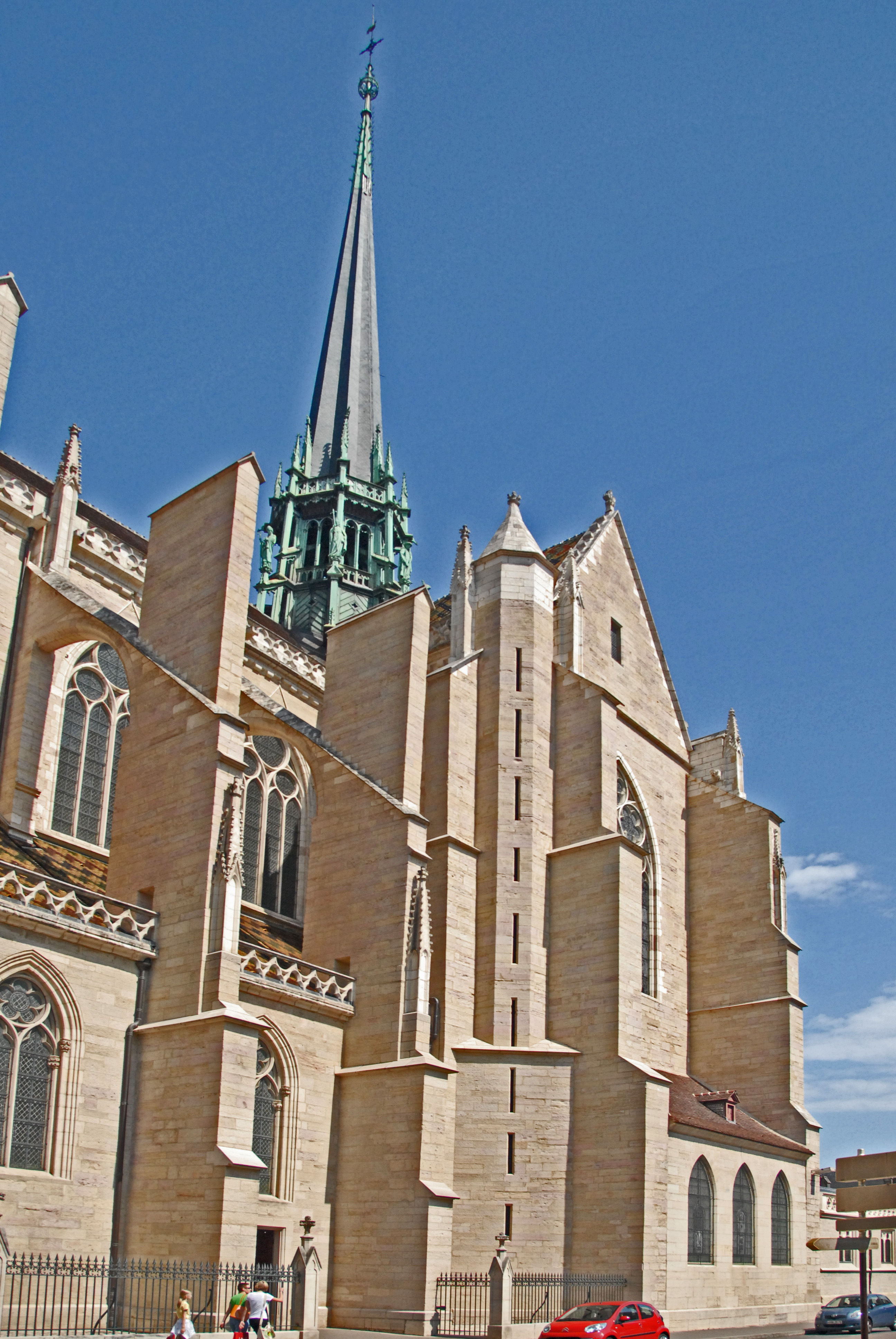 St-Bénigne, Querhaus u. Vierungsturm von SW